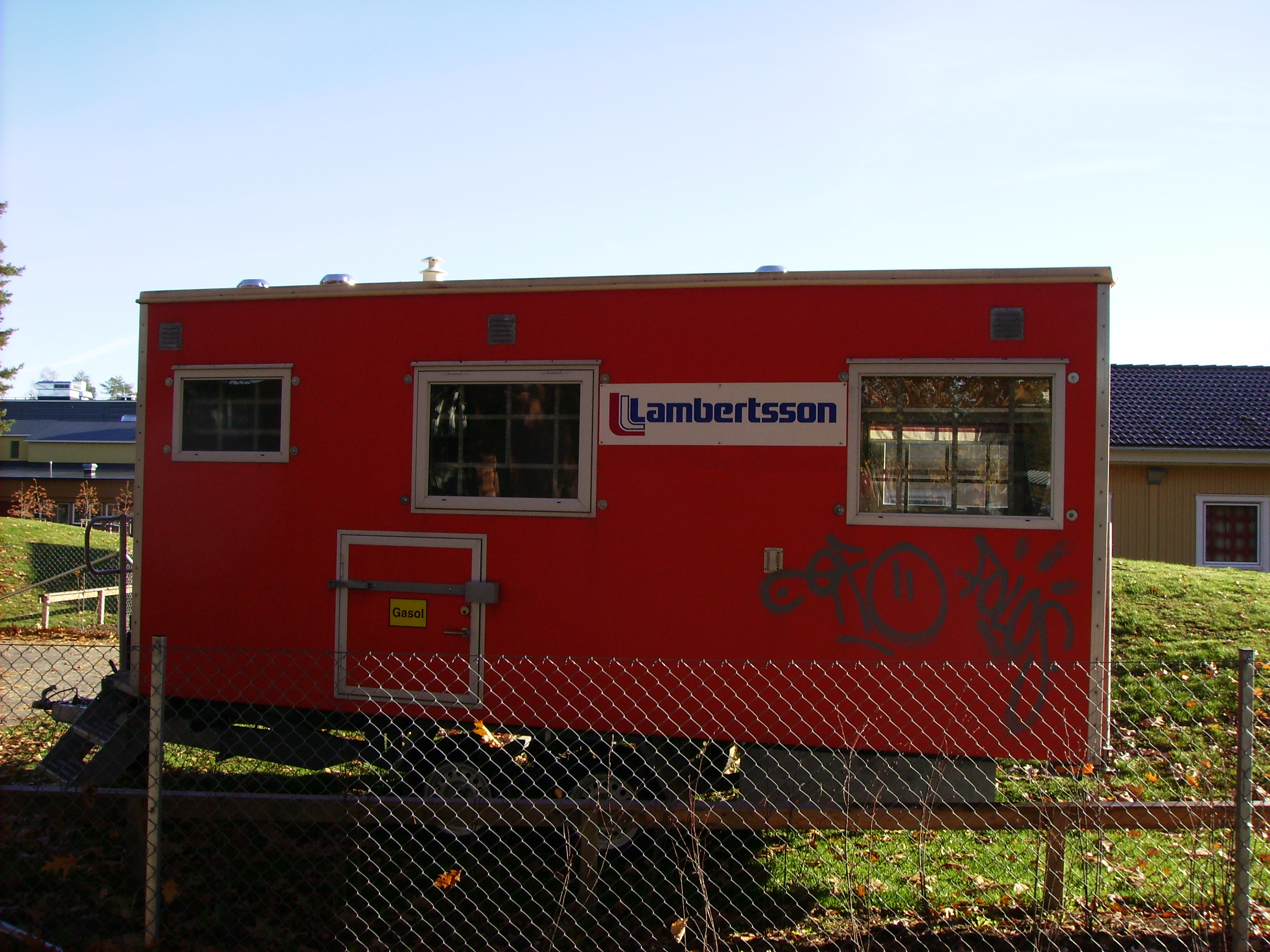 Byggbod vid Vivallaskolan